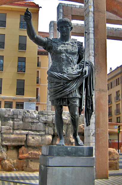 Augusto de Prima Porta en la Puerta de Toledo de Zaragoza (España)